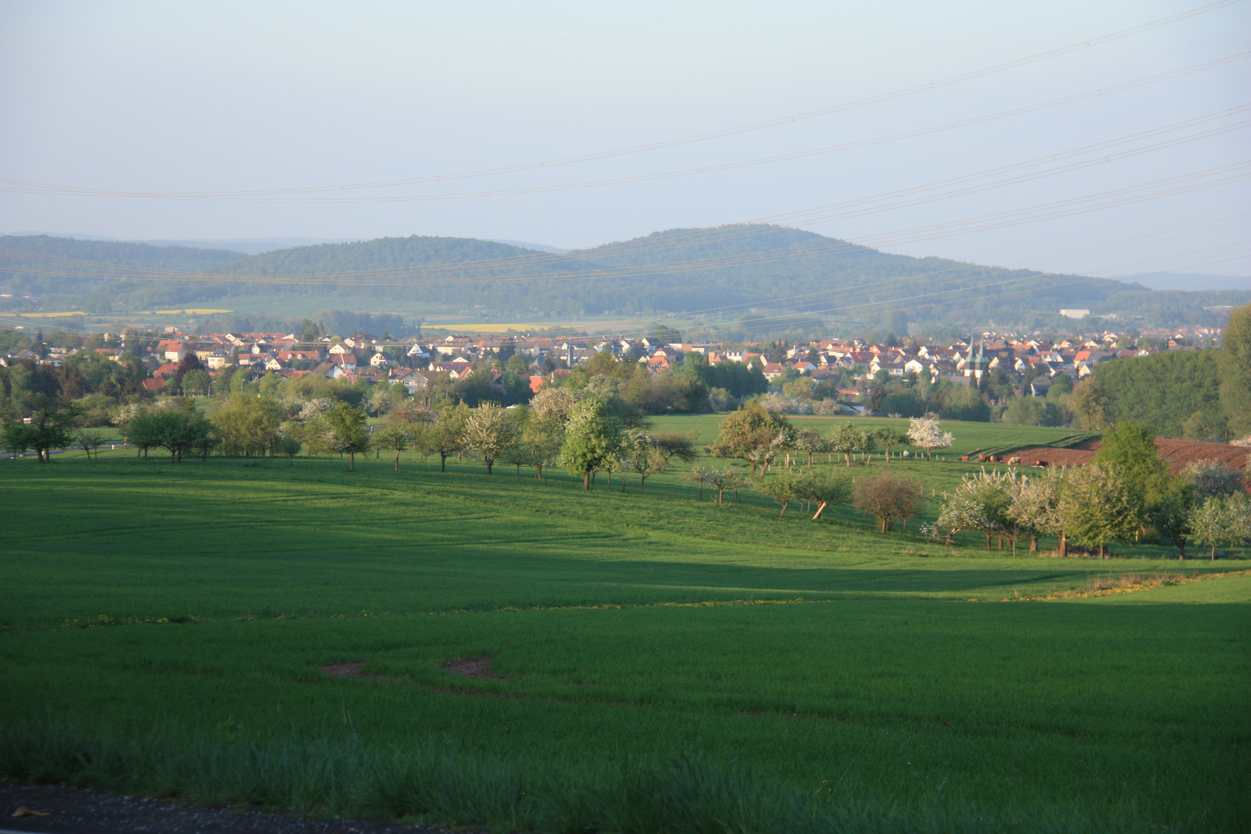 Der Freigerichter Ortsteil Somborn von Trages aus gesehen